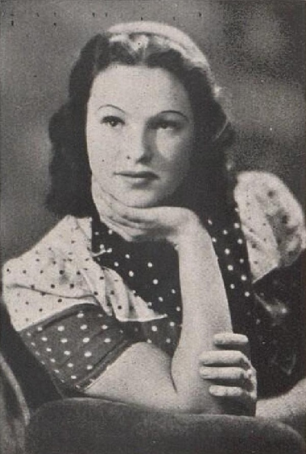 Marcella Sedláčková (1926-1969), česká divadelní a filmová herečka